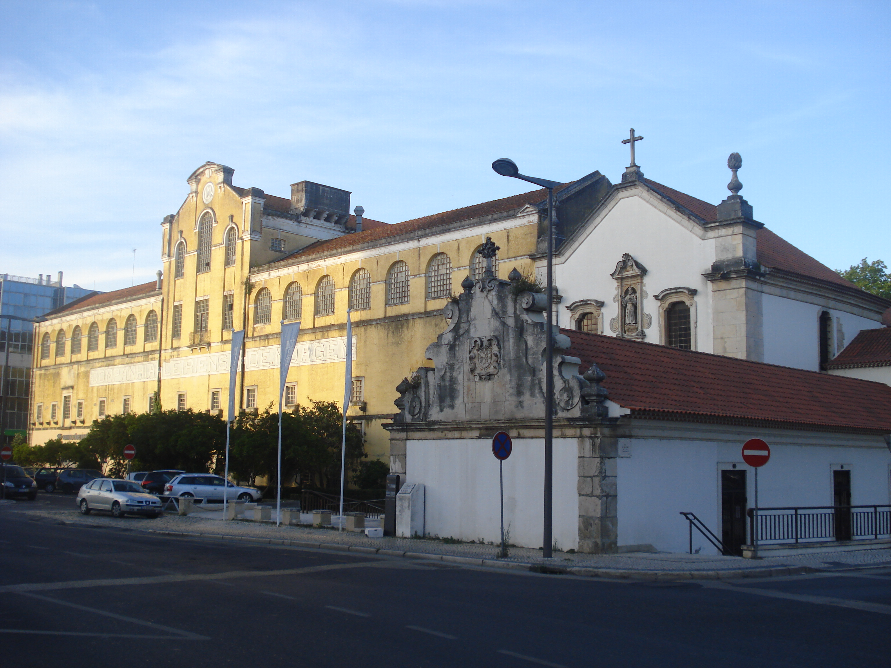 Igreja de São Francisco e antigo convento, agora Companhia de Moagem